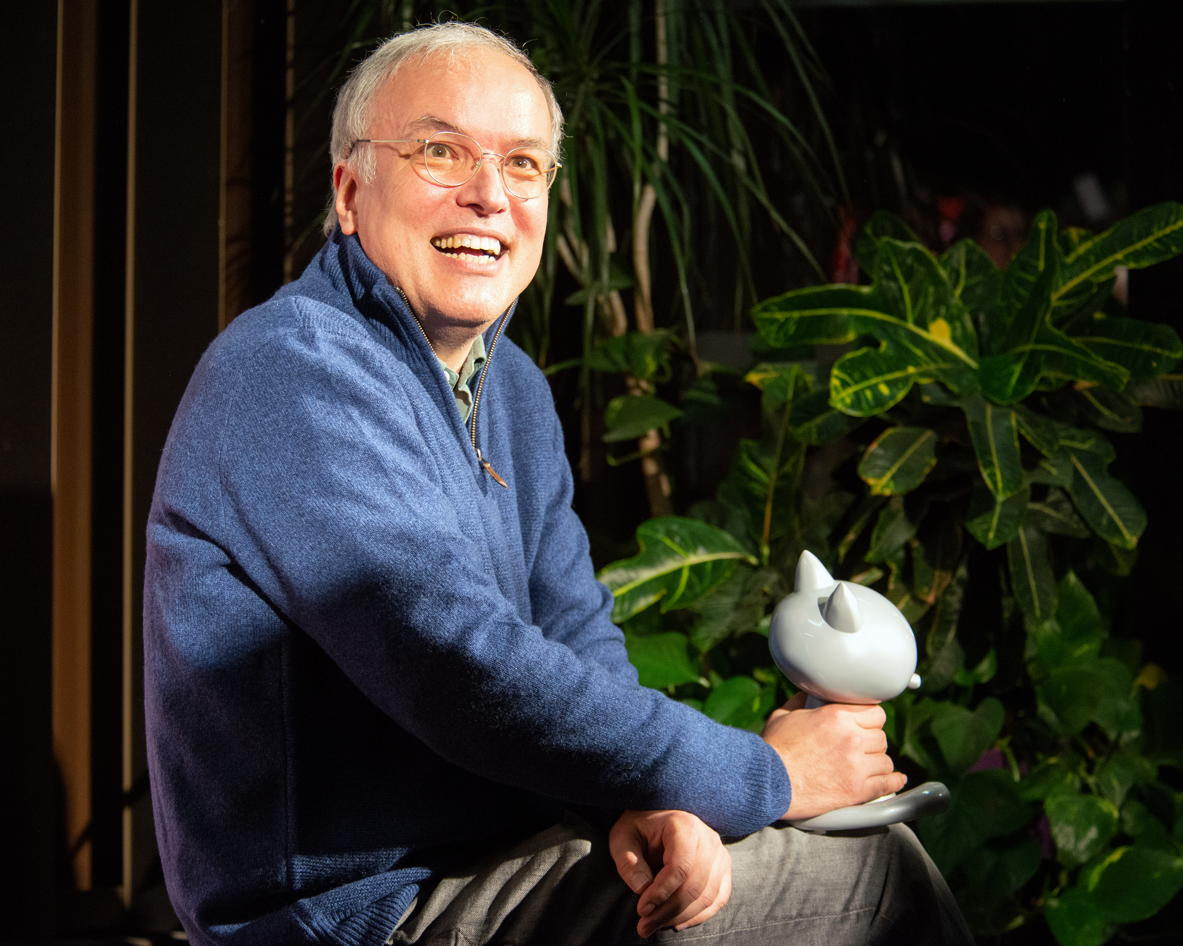 L'auteur de bande dessinée Emmanuel Guibert recevant le Grand prix 2020 au Festival d'Angoulême.